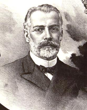 Manuel Antonio Caro (Valparaíso 1835 - †1903); pintor chileno, representante del realismo academicista.